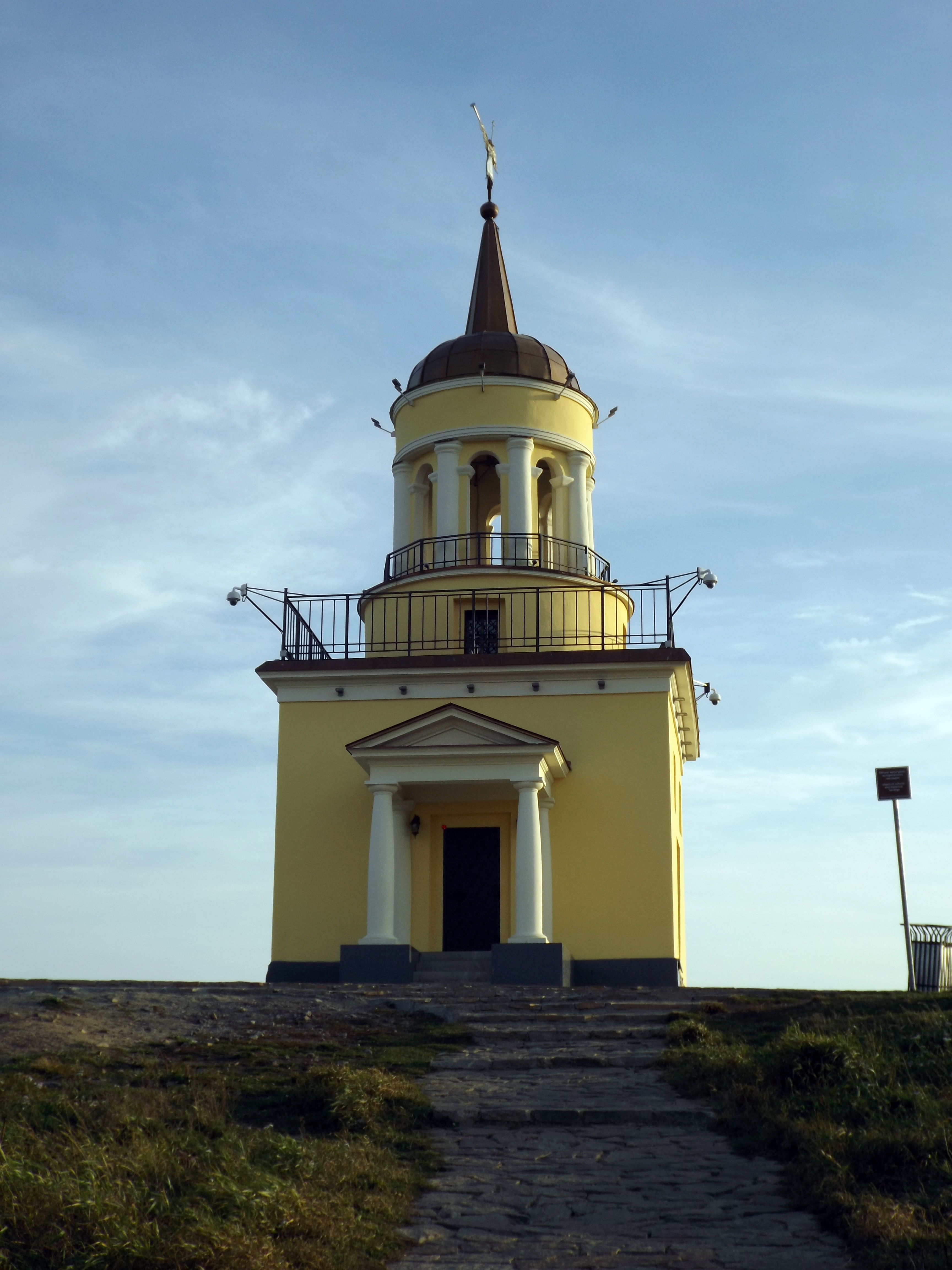 Башня сторожевая: Лисья гора, Нижний Тагил, Свердловская область